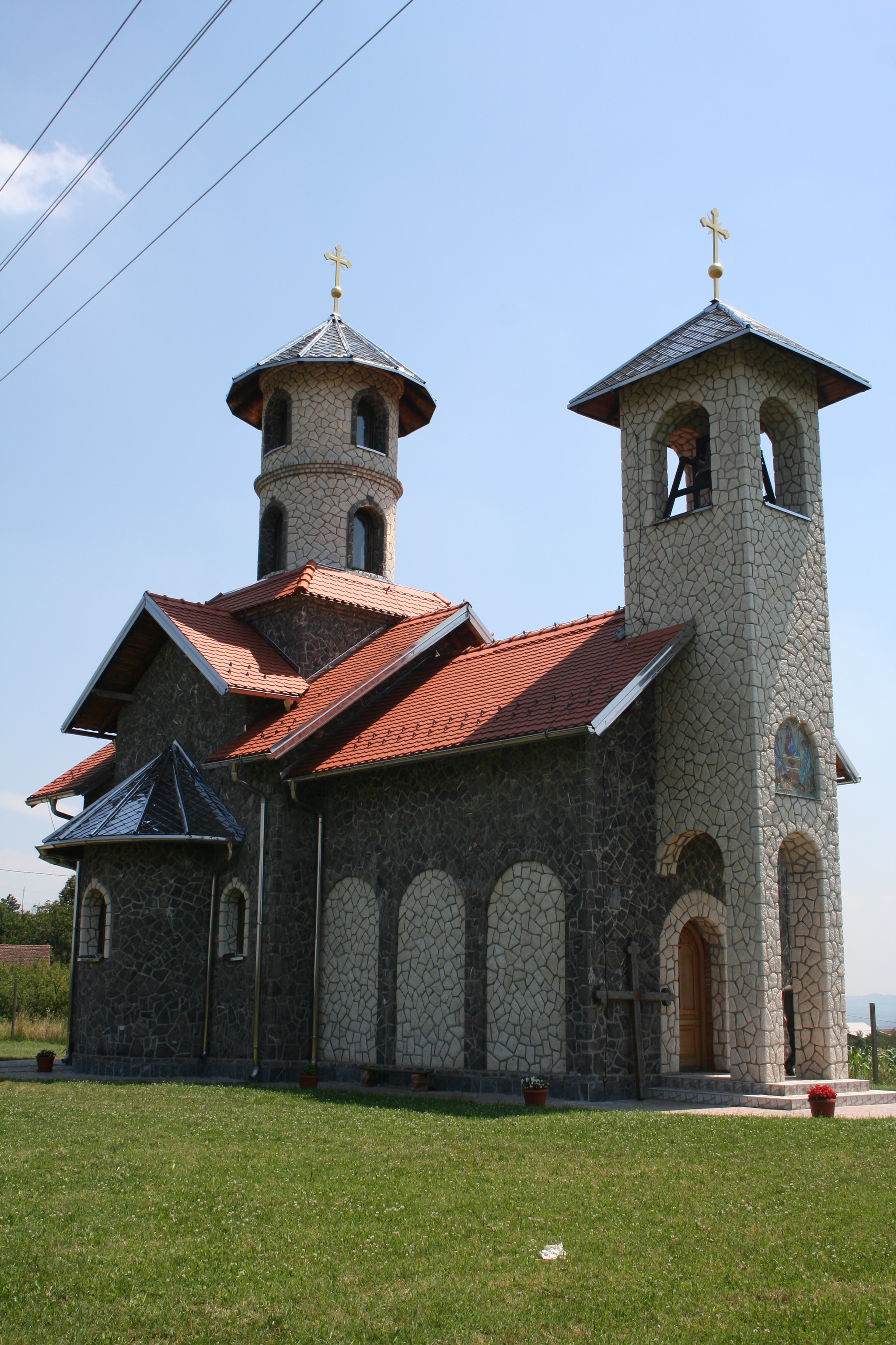 Crkva Svete Trojice, Bukor